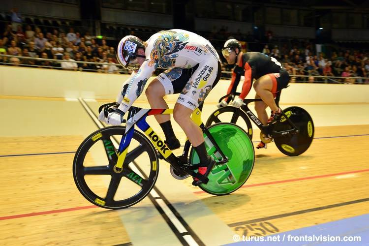 Maximilian Levy (vorne) gewinnt den Sprint gegen Robert Förstemann